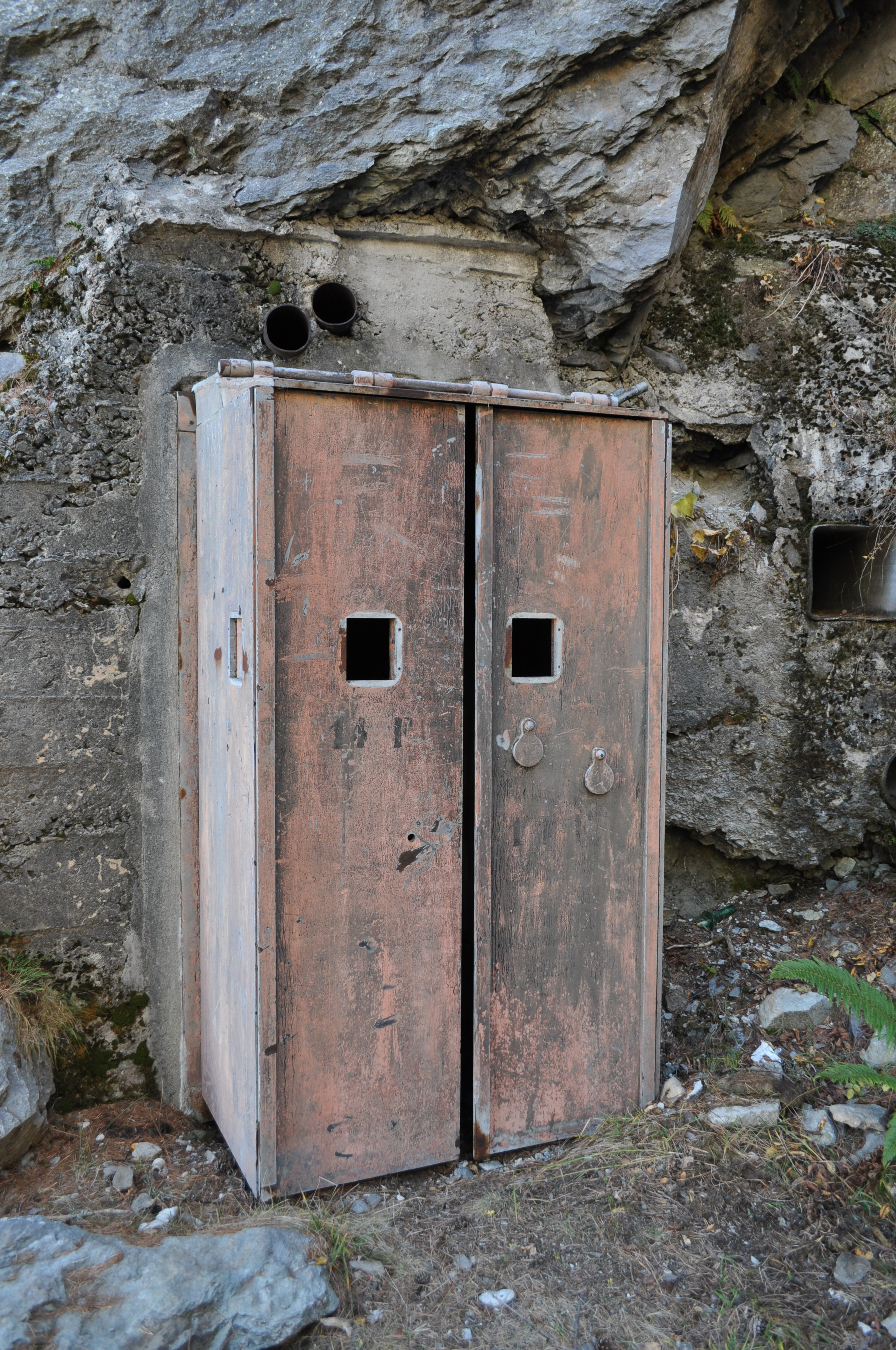 Porta in ferro che difende l'ingresso della batteria Sapelli, 606a Batteria S.P., Alta val Roia